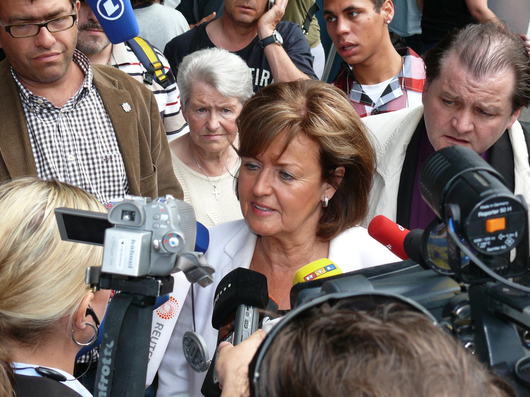 Gisela Friedrichsen nach dem Urteil im Kachelmannprozess am Landgericht Mannheim